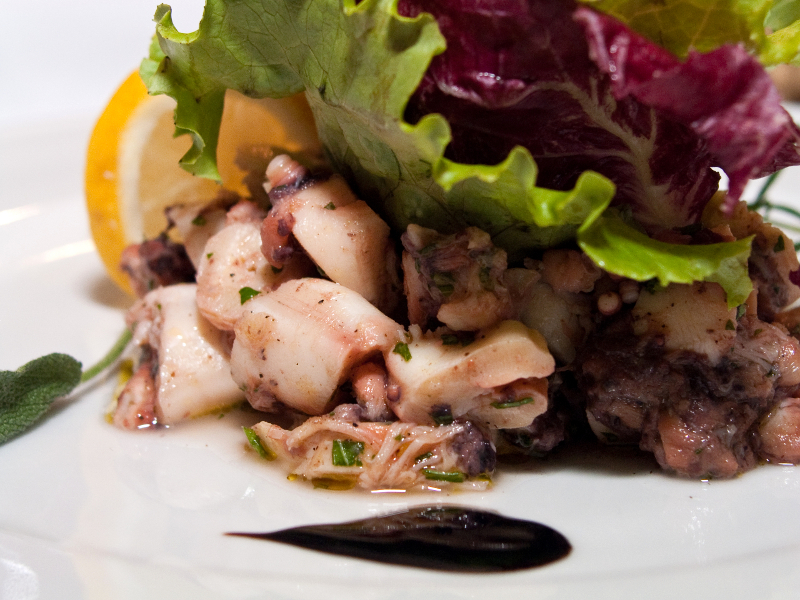 Mrkač (hobotnica) na salatu